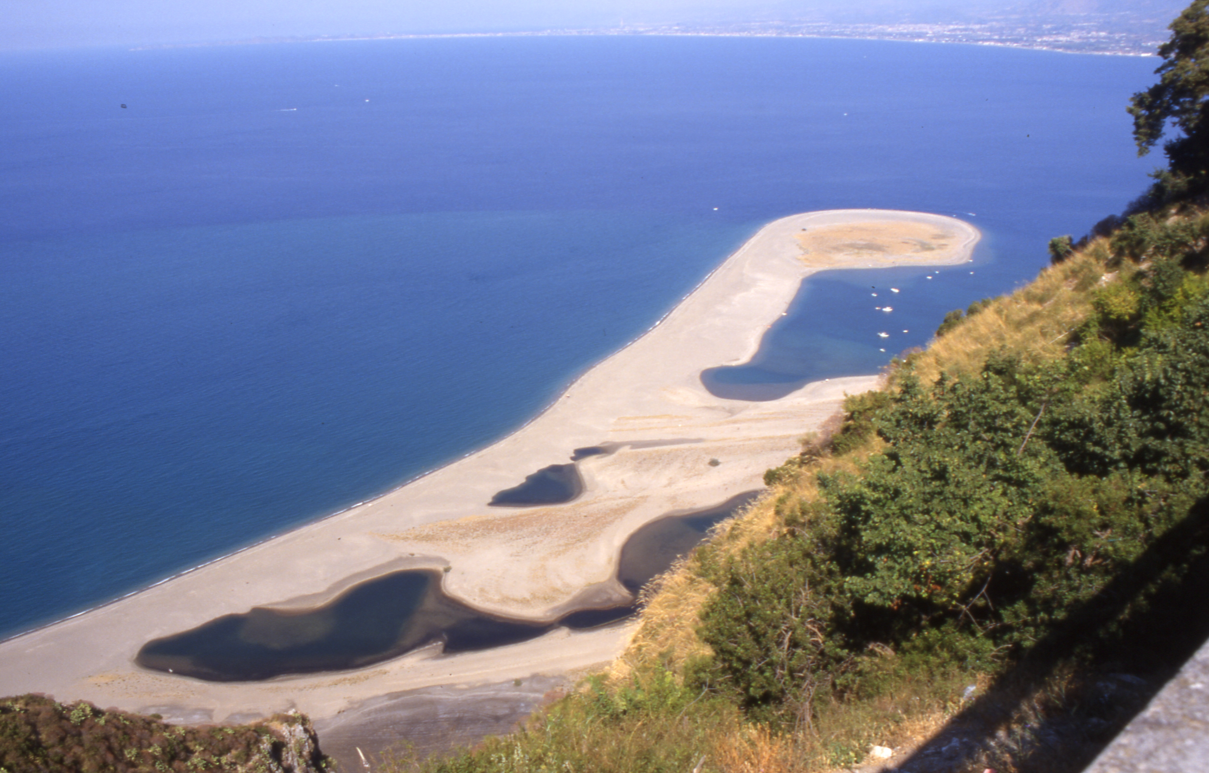 Lagune bei Tindaris / Patti